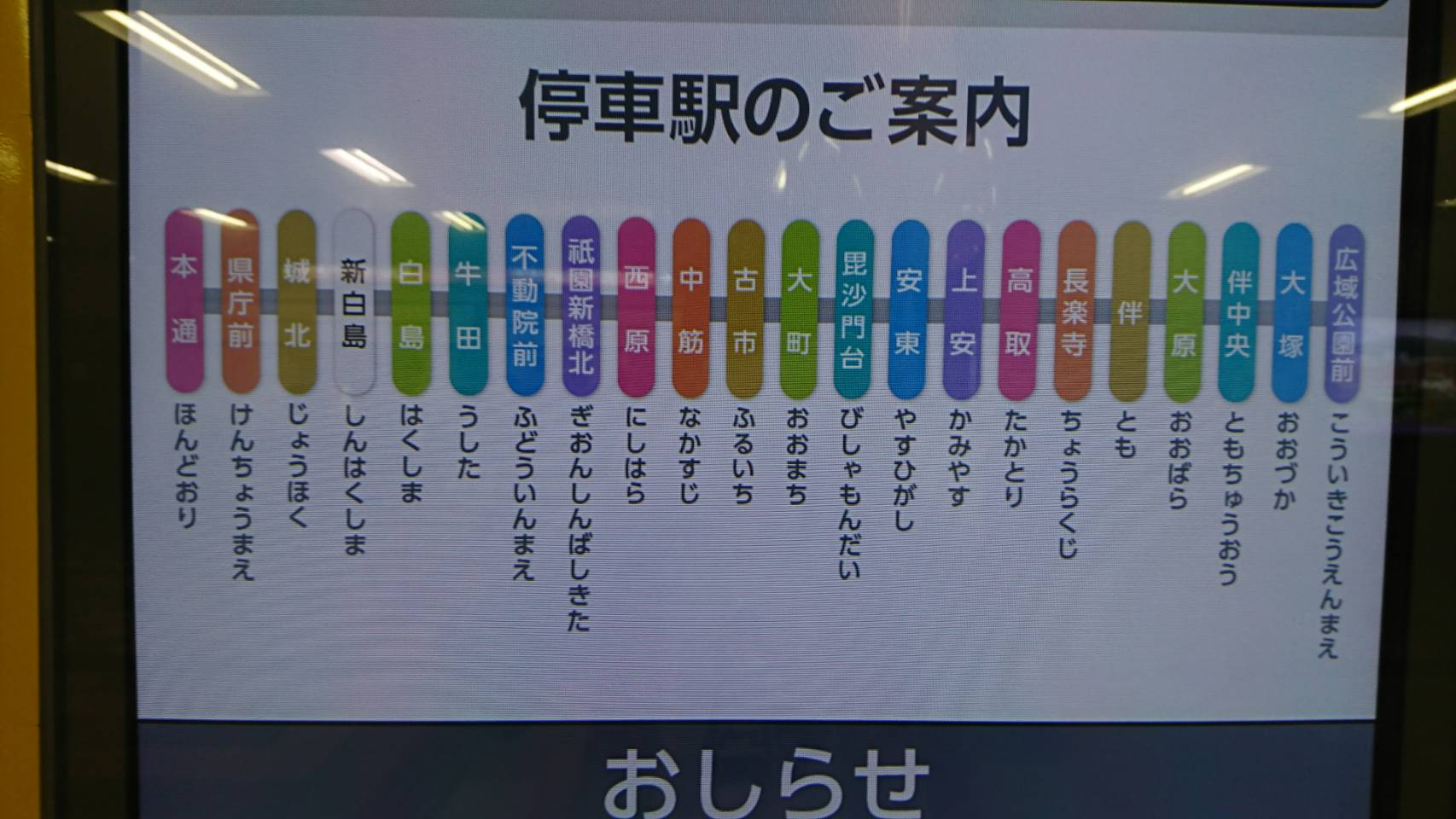 アストラムライン各駅のステーションカラー（本通駅にて撮影）